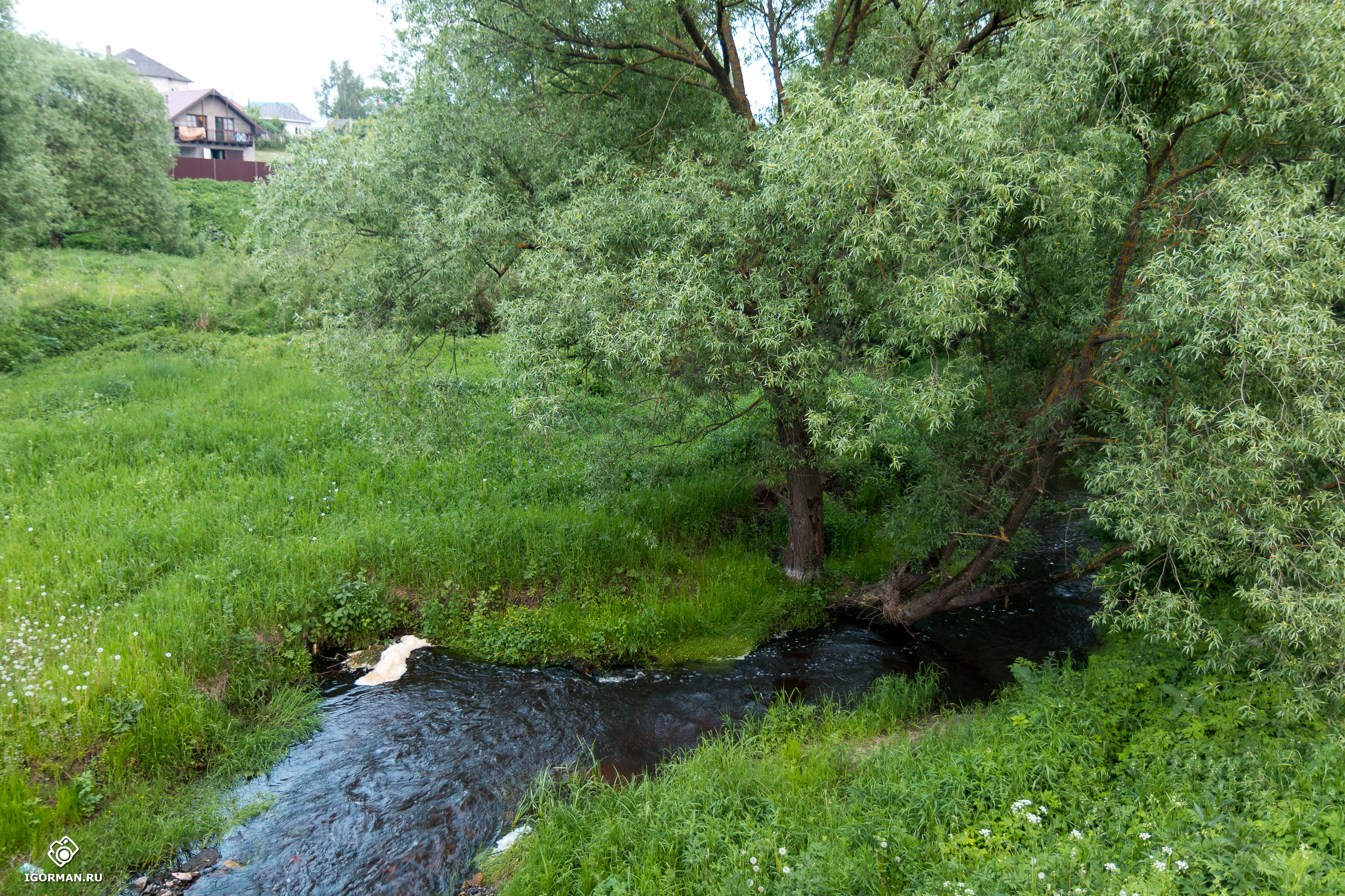 Река Дорка — река в Московской области (Раменский район), левый приток Гжелки. Русло реки в районе с.Загороново.